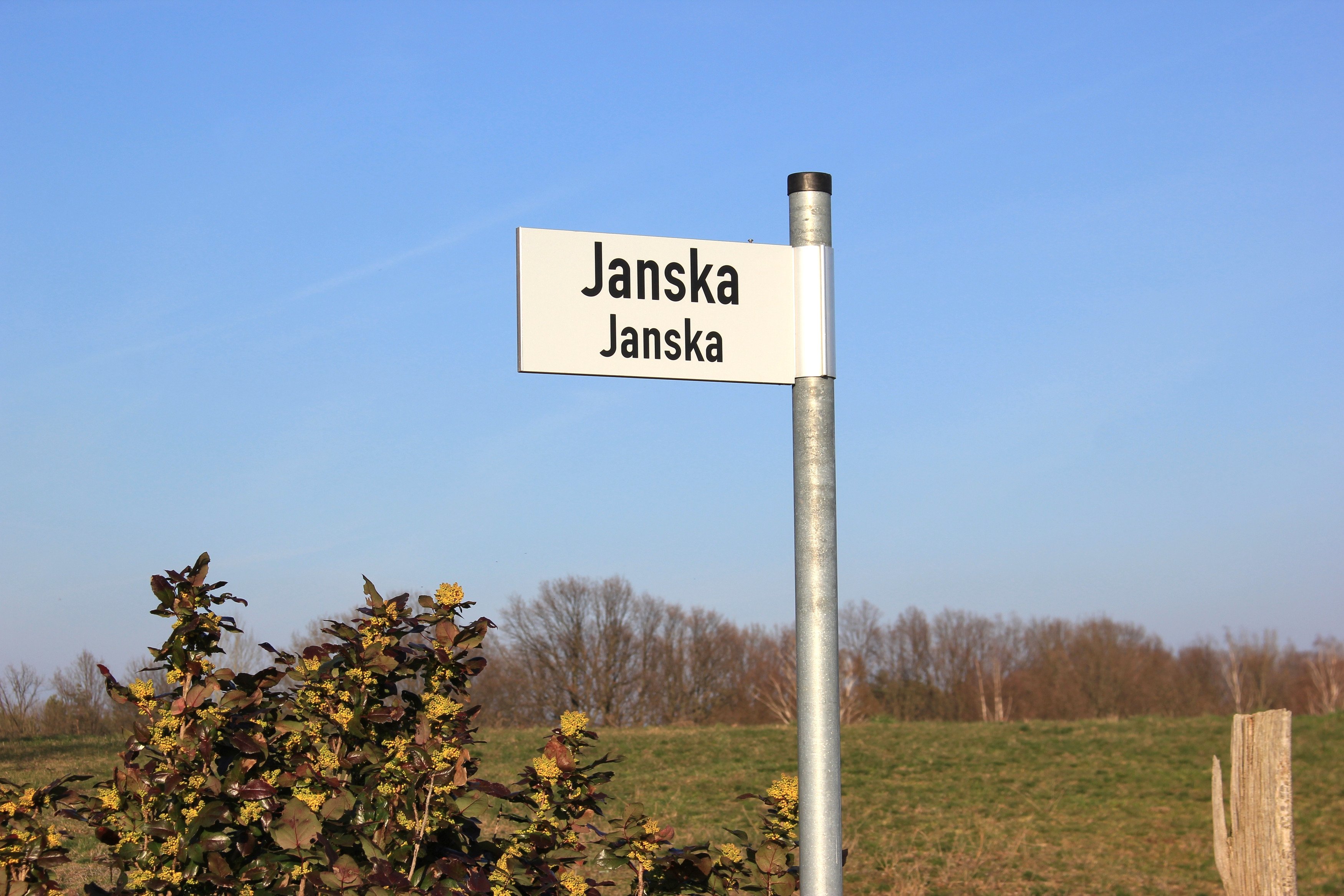 Hornjoserbsce: "Dwurěčna" nadróžna taflička Janskeje w Dobrošicach